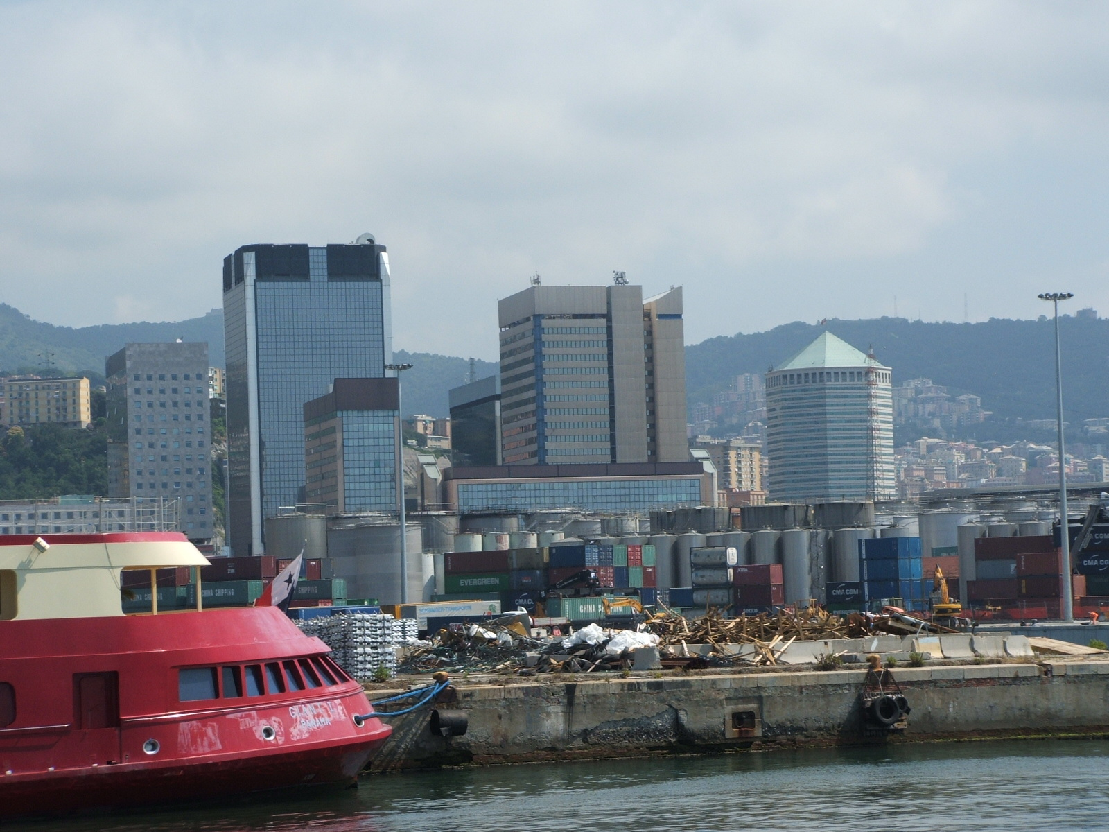 Porto di Genova, Italia.